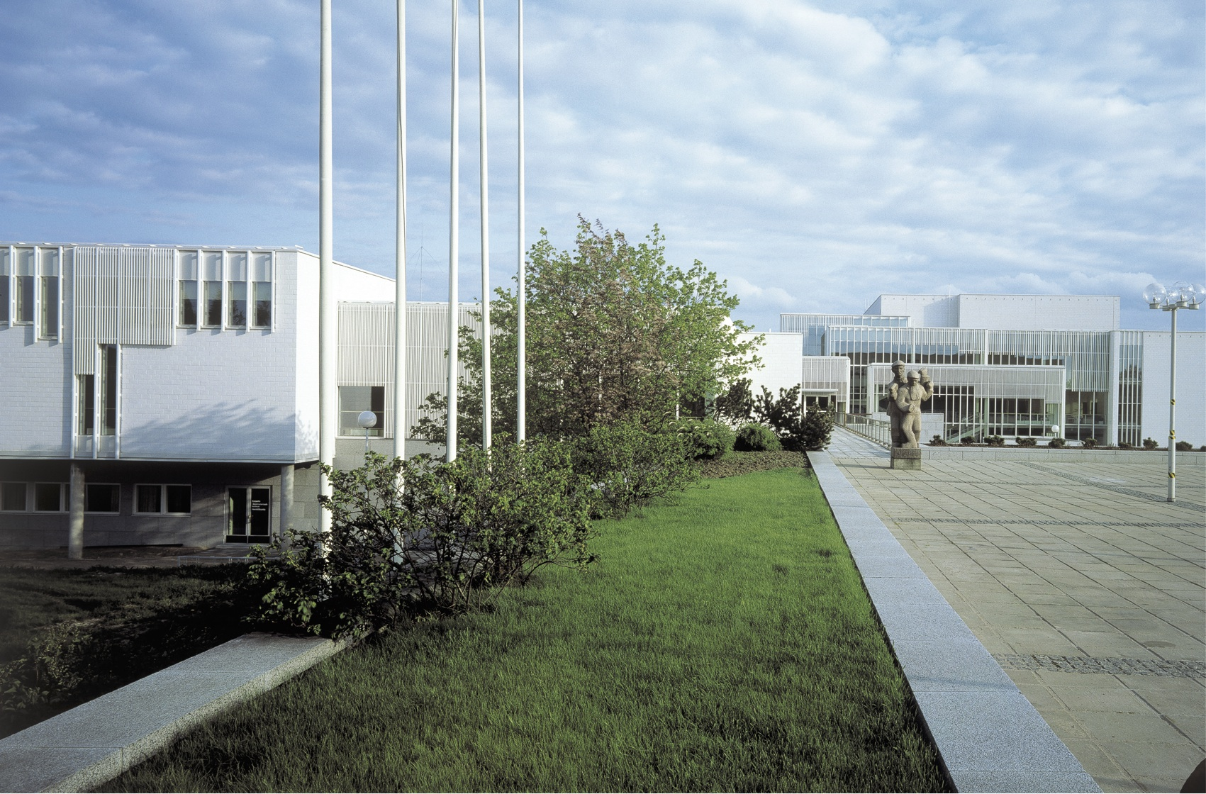 Imatran kulttuurikeskus. Vuonna 1986 valmistuneen rakennuksen on suunnitellut arkkitehti Arto Sipinen.